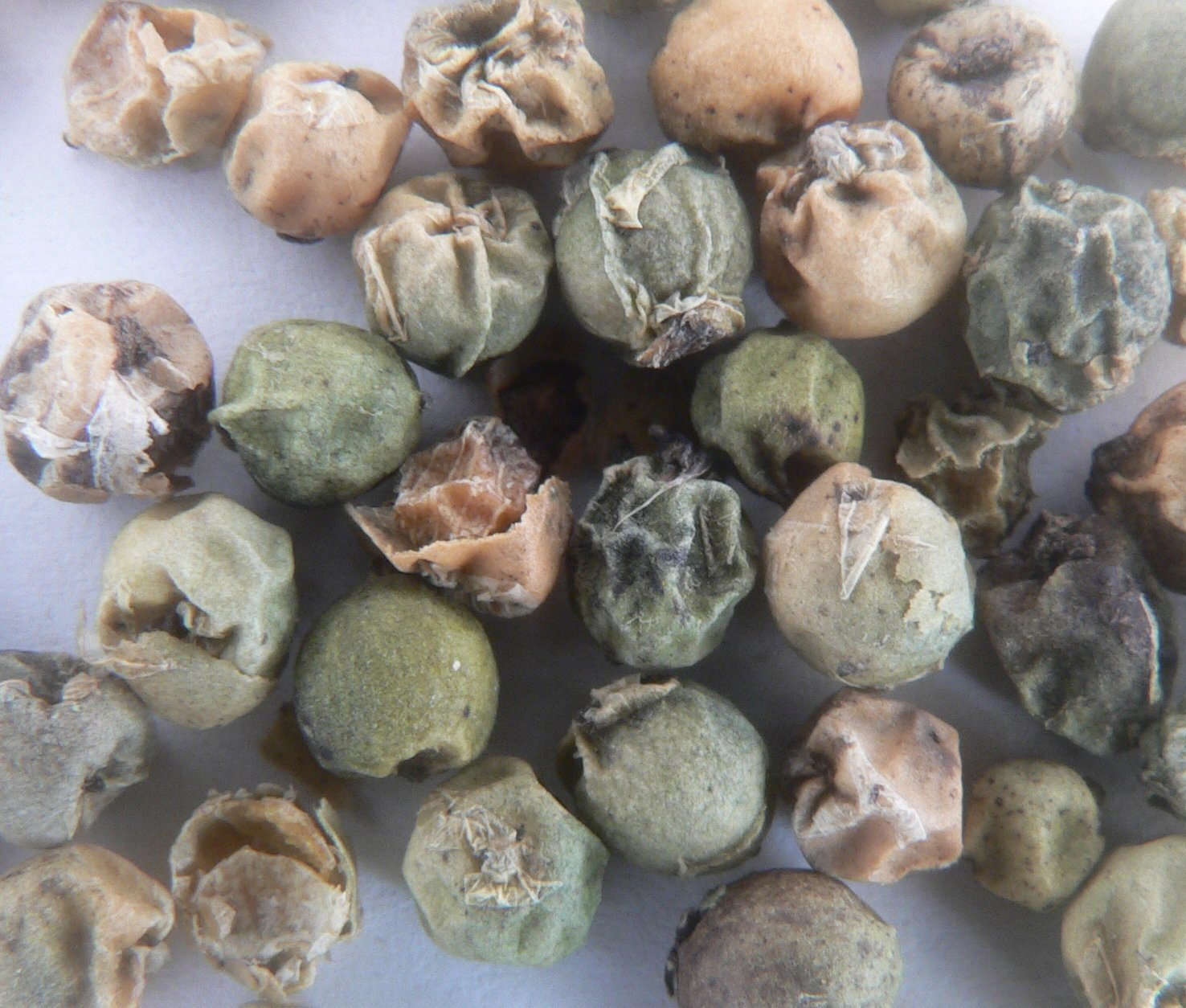 Piper nigrum, greenish